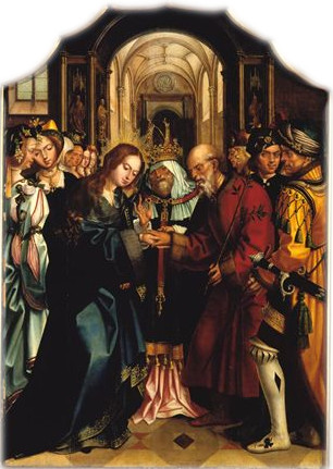 O retábulo "do Paraíso", assim designado uma vez que provém do altar-mor do extinto Convento do Paraíso em Lisboa, foi já objecto de alguns estudos que resultaram em opiniões diversas e divergentes no que toca à sua autoria. Num primeiro momento, o conjunto foi atribuído a Grão Vasco (Vasco Fernandes), por Taborda e Cirilo, opinião refutada por Raczynski que propôs o nome de Abram Prim (Primus). Carl Justi apontou como autor o pintor Velascus e Émile Bartaux dividiu a série em dois conjuntos, atribuindo a "Anunciação", a "Visitação" e a "Natividade" a Cristóvão de Figueiredo, e os restantes painéis ao "Mestre do Retábulo de Santiago". Foi, porém, José de Figueiredo quem reagropou novamente as oito pinturas e as enquadrou na obra do "Mestre do Paraíso", no que foi secundado por Reinaldo dos Santos. A Myron Malkiel-Jirmounsky, coube alertar para o facto de estarmos na presença de uma obra colectiva e não de um só pintor. Actualmente, e na esteira deste último historiador, ainda que se destaque o nome de Gregório Lopes na atribuição deste conjunto retabular, não há dúvida em se afirmar que se trata de uma obra de parceria, o que é desde logo visível na heterogeneidade pictórica e técnica das várias tábuas que o compõem.